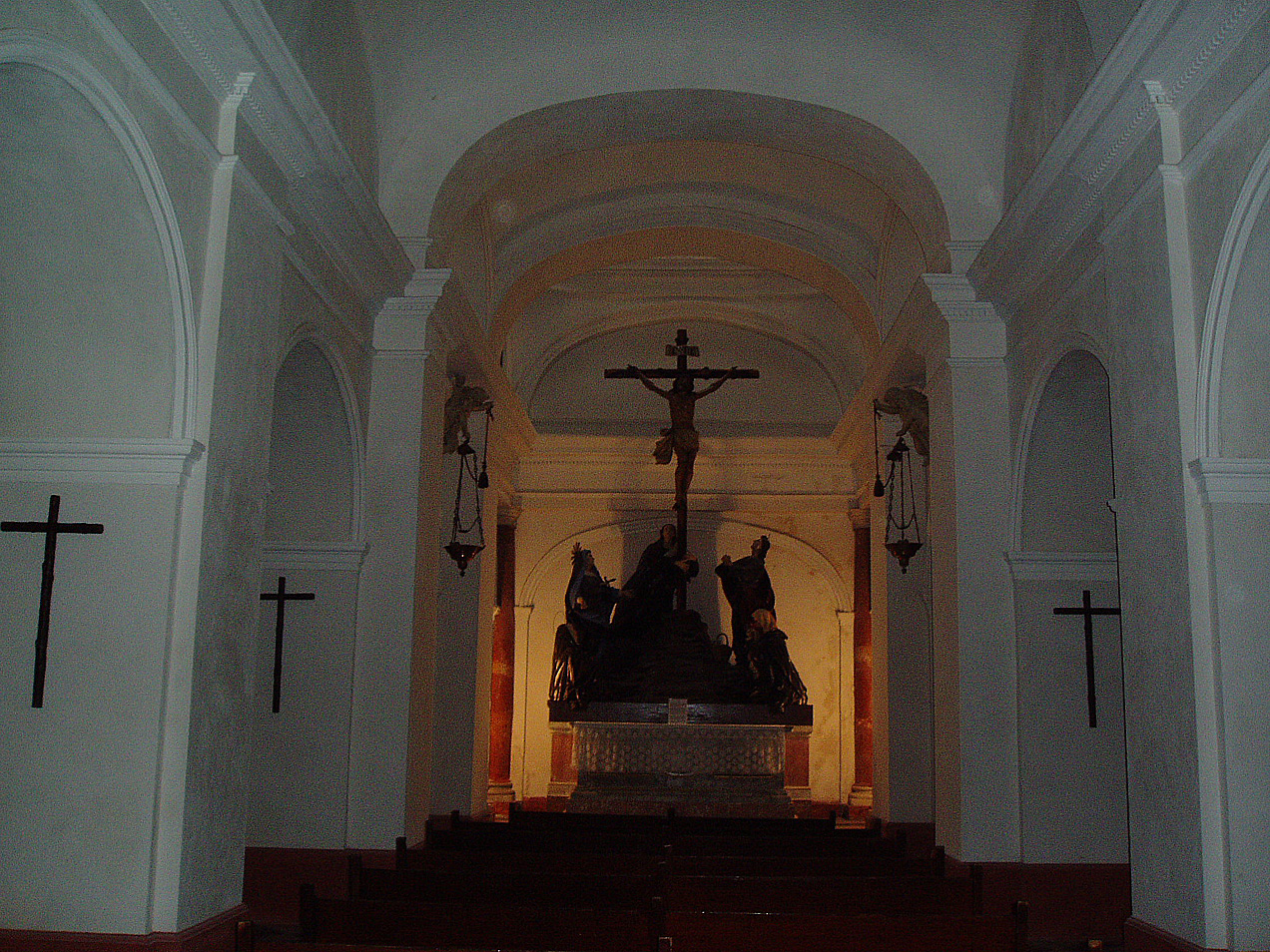 Oratorio de la Santa Cueva de Cádiz.